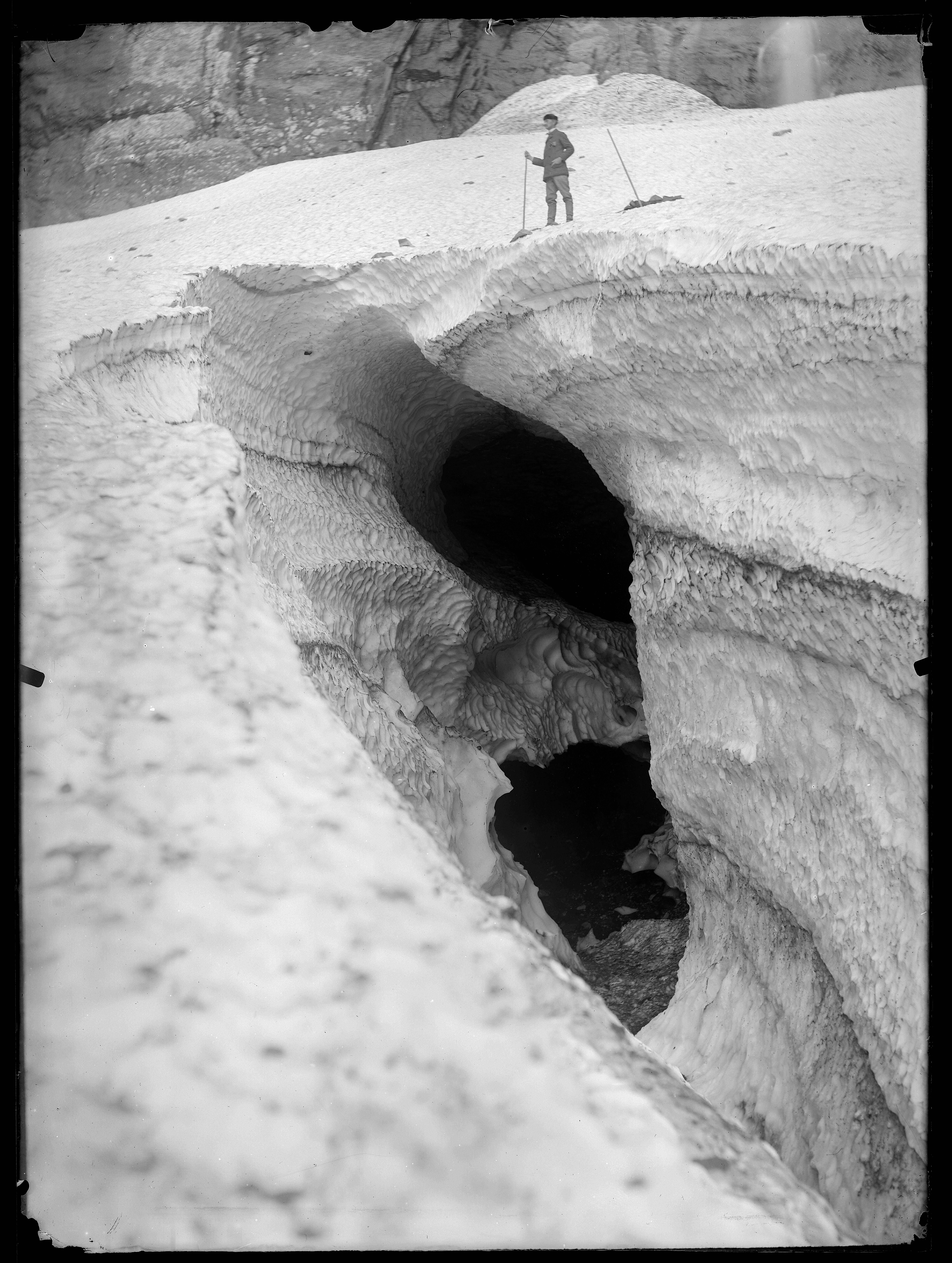 plaque négative au gélatino-bromure d'argent, format 18x24 cm. Sans inscription ni mention d'auteur. Henry Russell